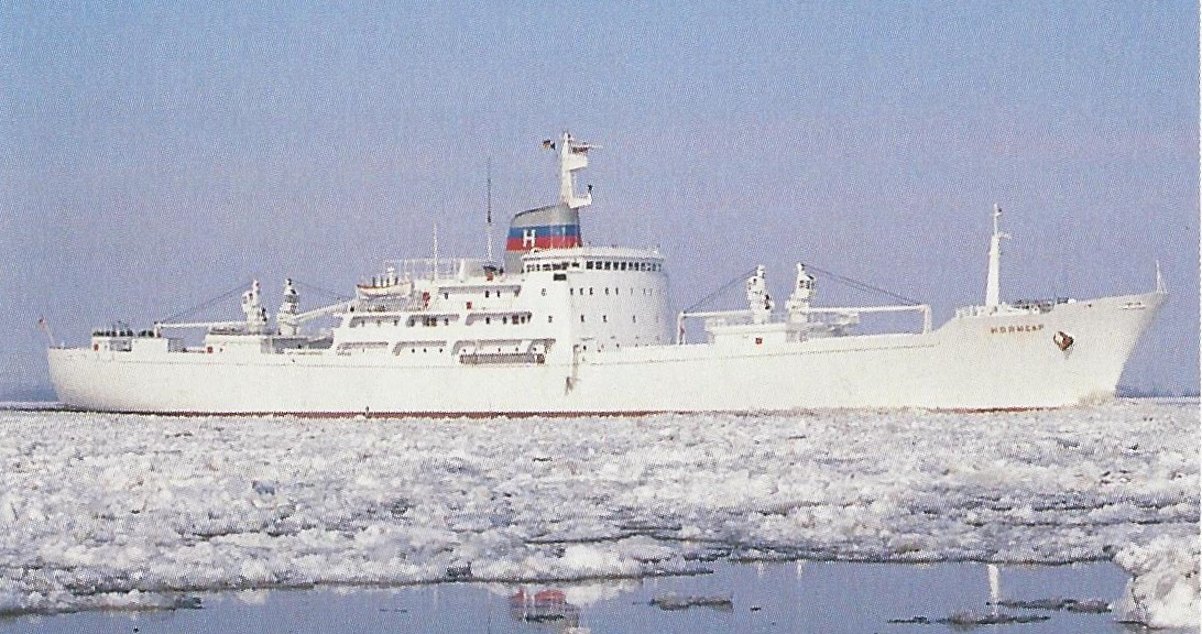 MS Horncap bei Eisgang auf der Elbe vor Grünendeich.